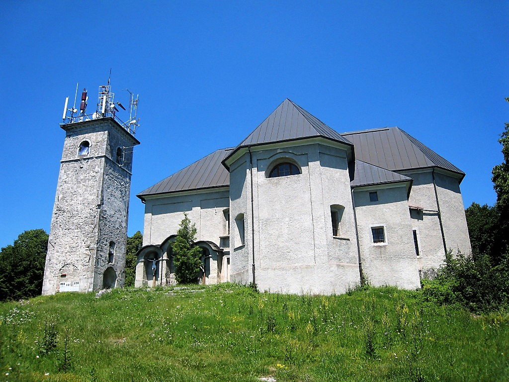 Cerkev sv. Križa, Podlož